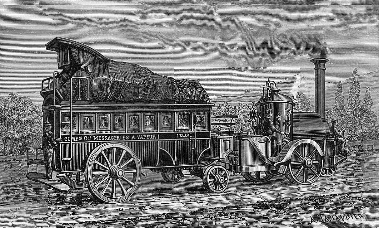 Voiture des Messageries à vapeur (1867, France - A. Jahandier).